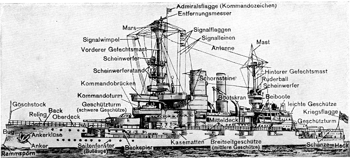 German battlecruiser "Schlesien" (1906)